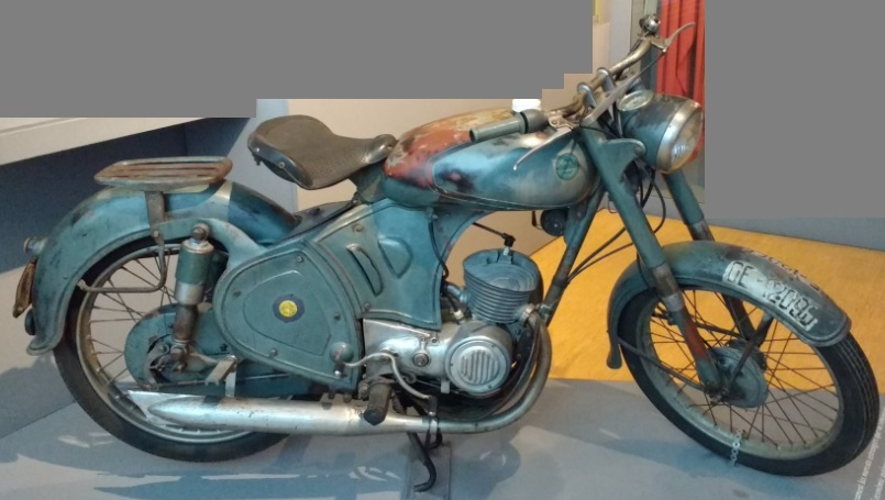 Motocicleta Narcla Girona. Mides: 103x190x68 cm Datació: 1950 Museu d'Història de Girona